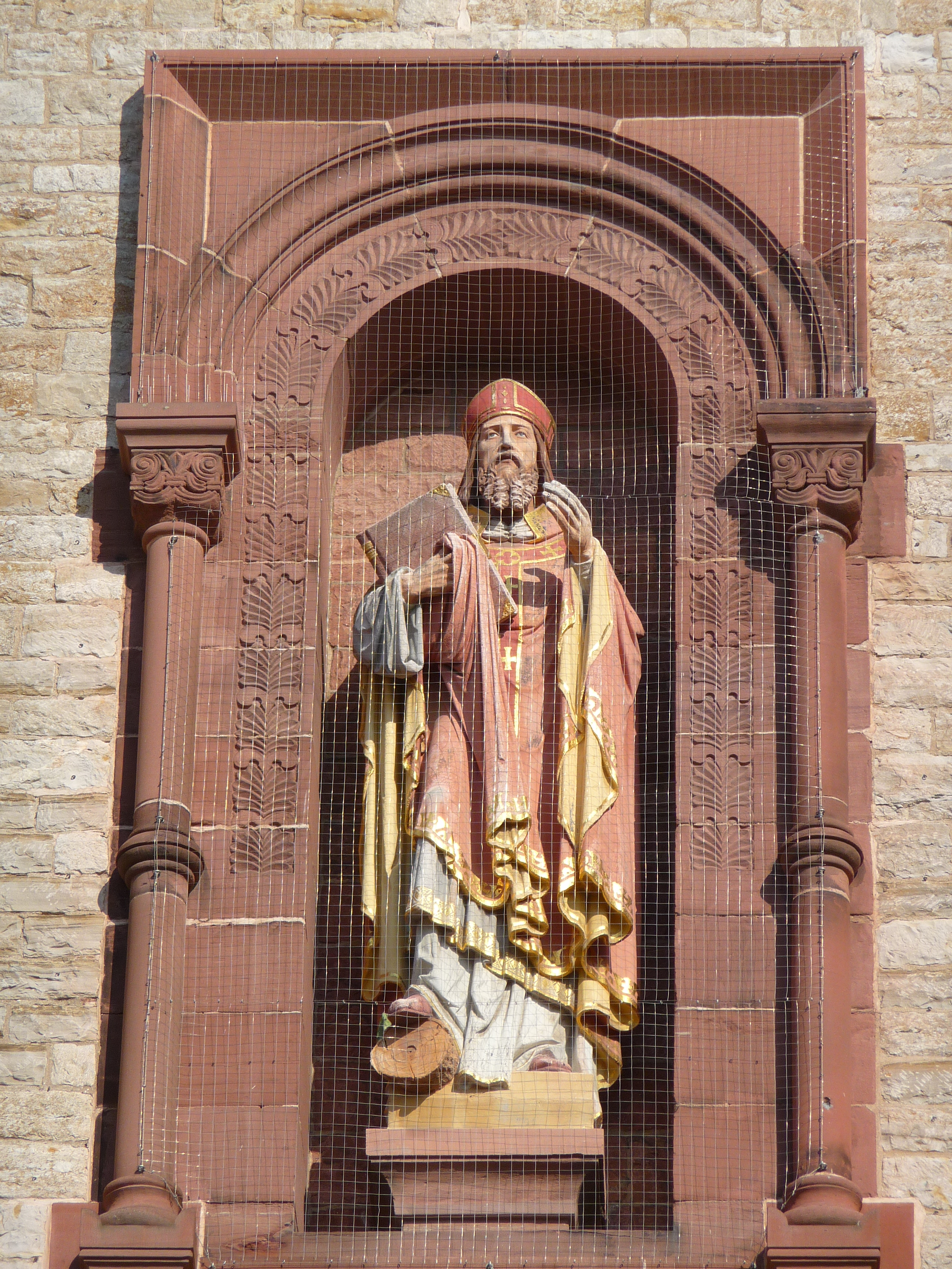 St. Bonifatius in der Heidelberger Weststadt (Baden-Württemberg, Deutschland); St. Bonifatius am linken Turm des Hauptportals